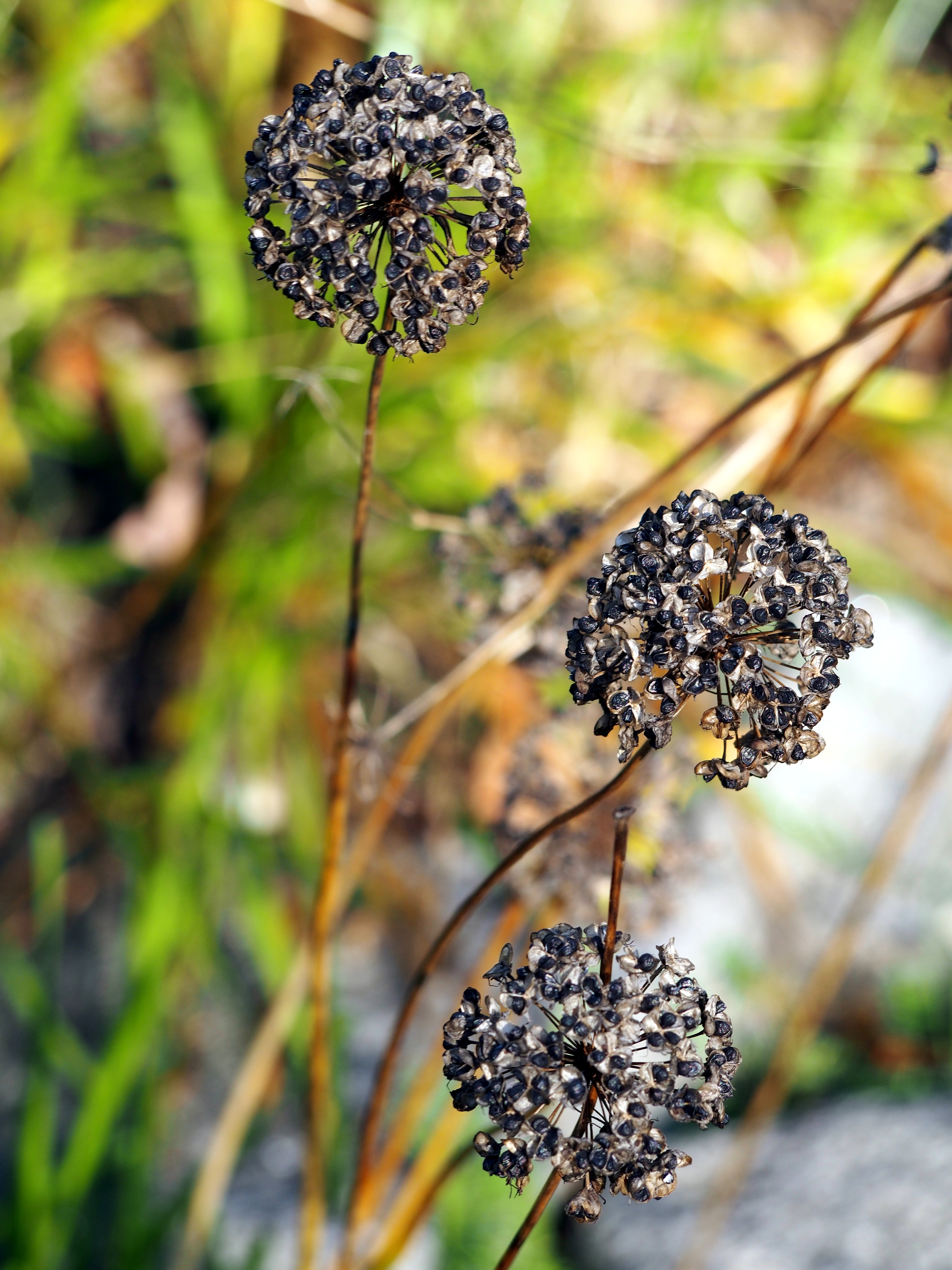 Owocostany Allium lusitanicum (syn. Allium senescens subsp. montanum, czosnek skalny), okaz uprawiany. Ogród Botaniczny Uniwersytetu Wrocławskiego, Wrocław, Polska.